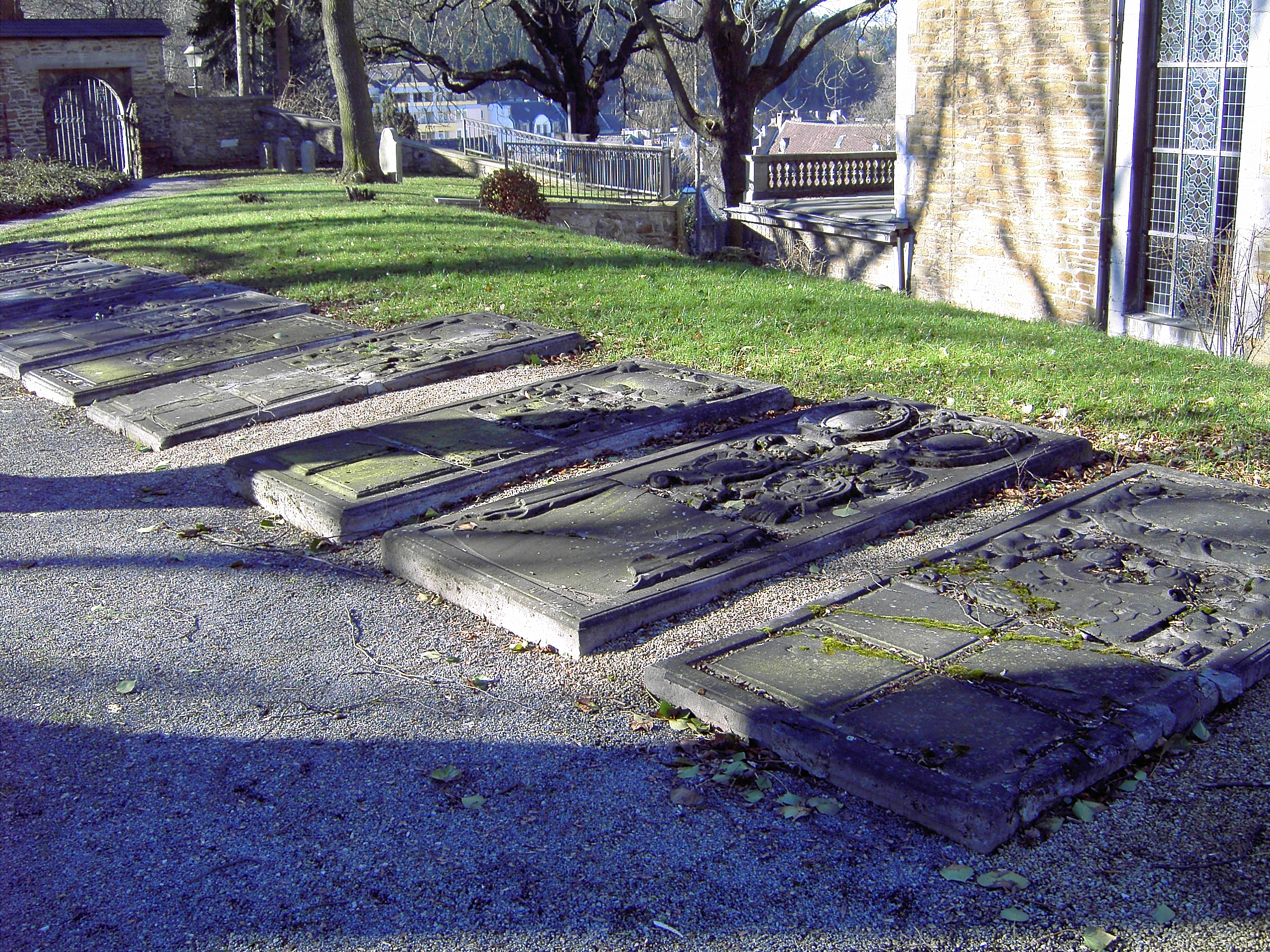 Grabplatten des Kupfermeisterfriedhofs